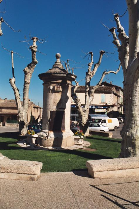 Département de Vaucluse/ Commune de Robion/ La pompe/ Photo personnelle prise en 2005